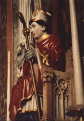 La statue de Saint-Ursmer dans l'église d'Ormeignies (photographie personnelle)Utilisateur:Daniel71953